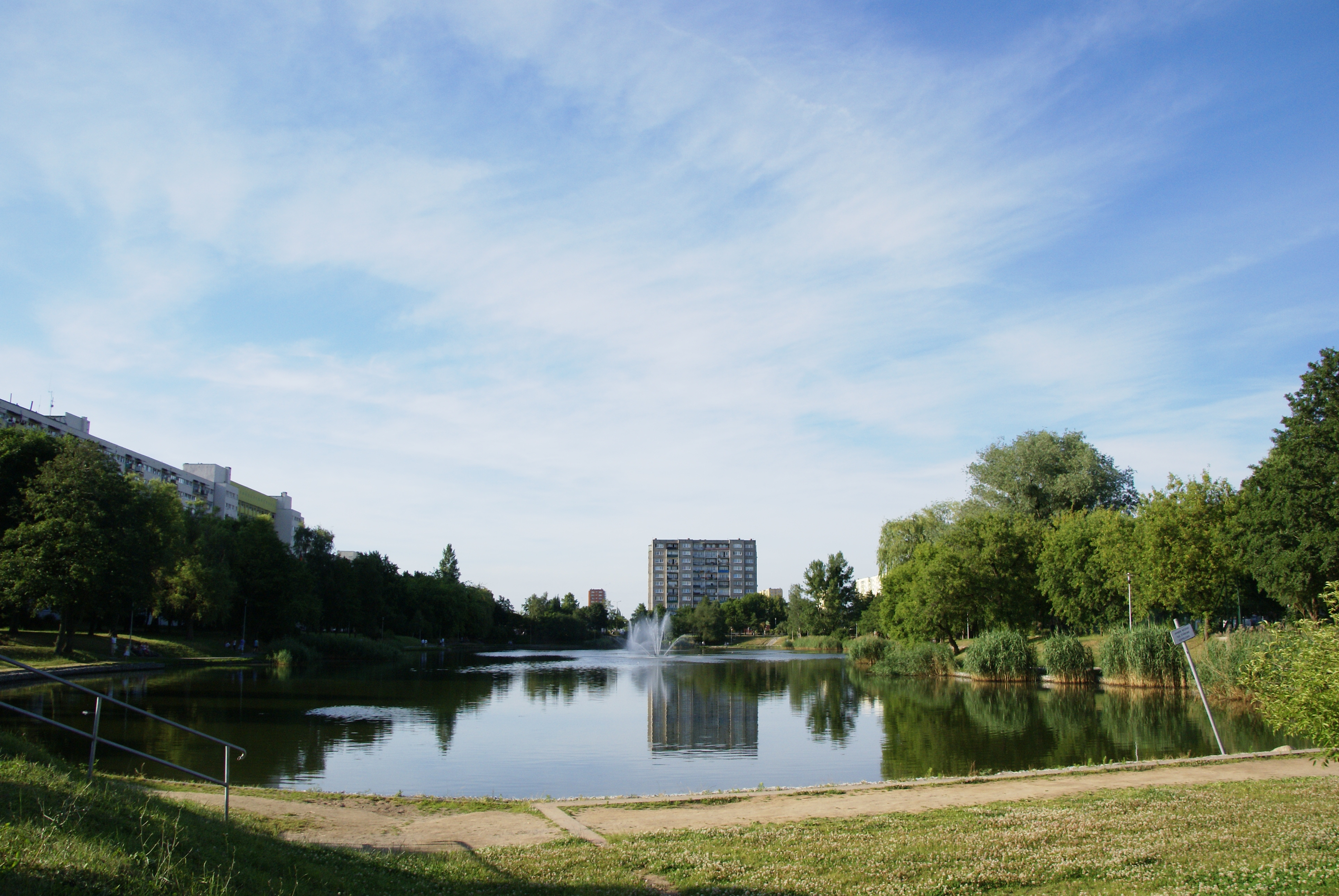 Balaton - akwen z fontannami, położony między ul. Polanką, Swarzewską i Skłodowskiej-Curie na osiedlu Bartodzieje w Bydgoszczy.